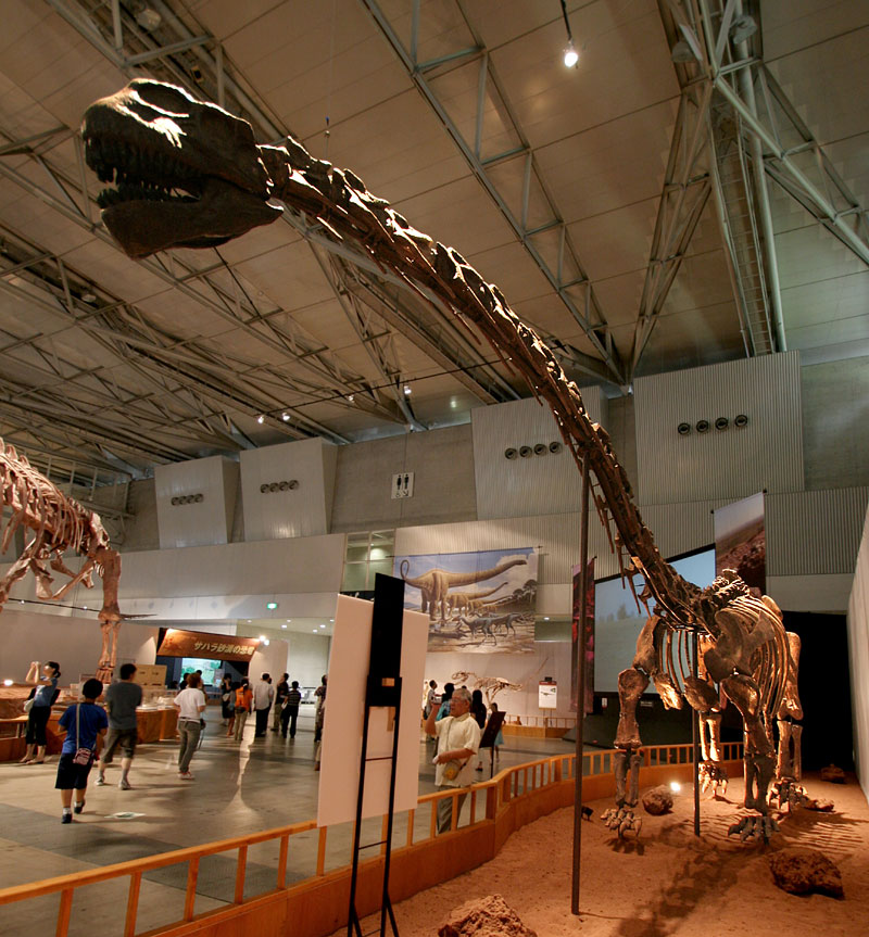 Klamelisaurus - 02